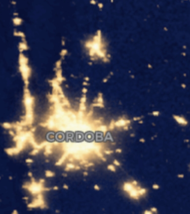 Imágen satelital de la NASA, tomada de noche sobre el área urbana de la ciudad de Córdoba y sus suburbios.